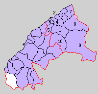 島根県安濃郡の町村制時点の町村。